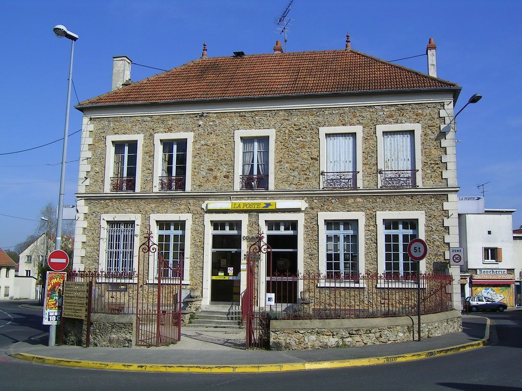 la Poste, place de Verdun Photo personnelle (own work) de Marianna